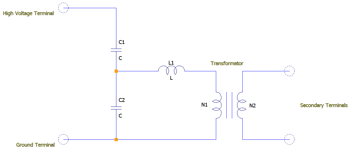 Eine Schaltungszeichnung eines Kapazitiven Spannungswandlers in LTSpice.